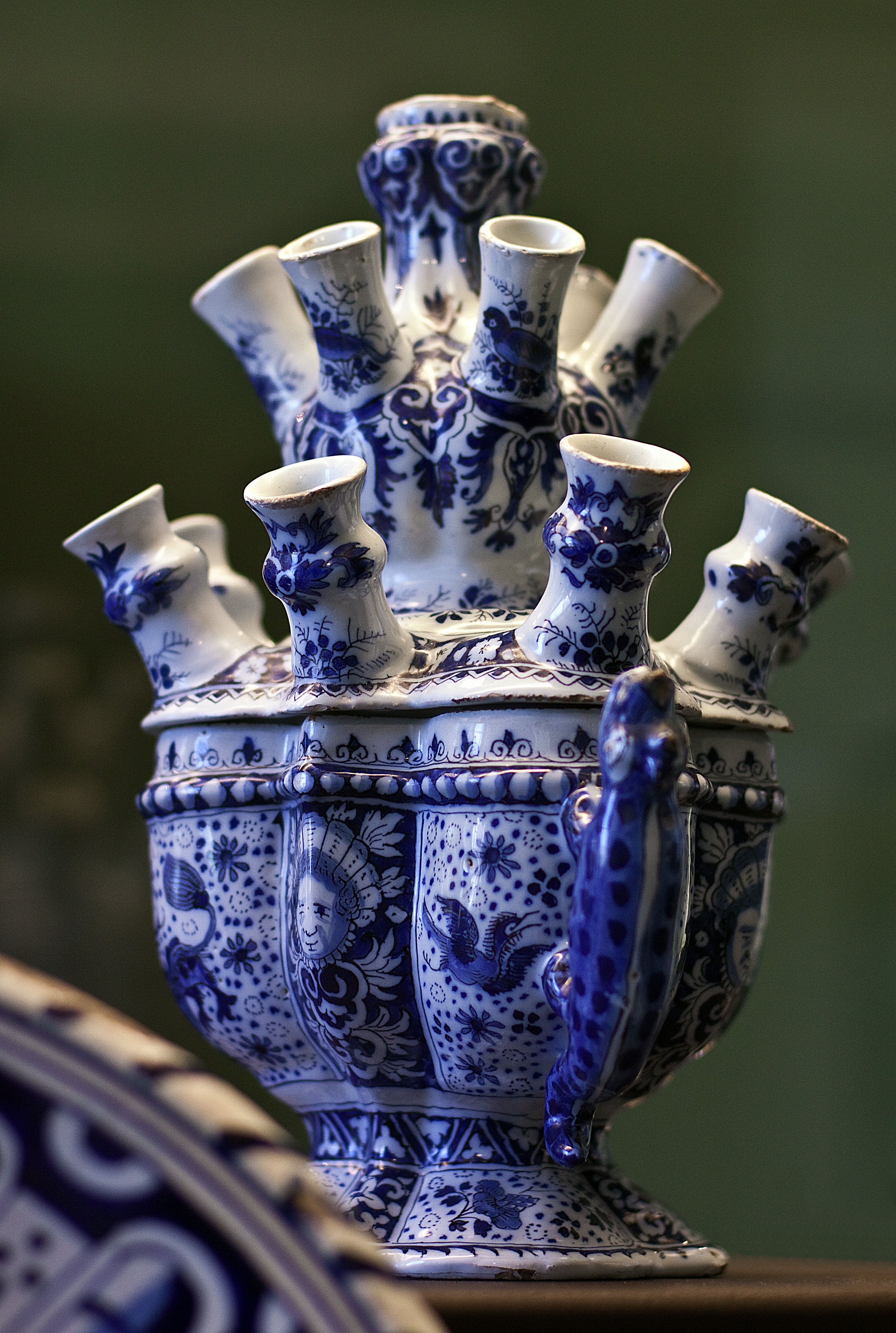 Vitrine Majolica en Delfts aardewerk (Toegepaste kunst en Design, zaal 44) Country: Netherlands City: Rotterdam Location: Museum Boymans van Beuningen Artist: Unknown Name: Tulpenvaas (Delft), 1700-1800